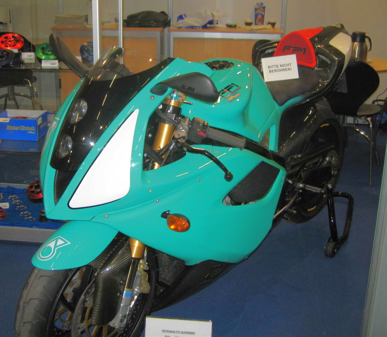 Petronas FP1